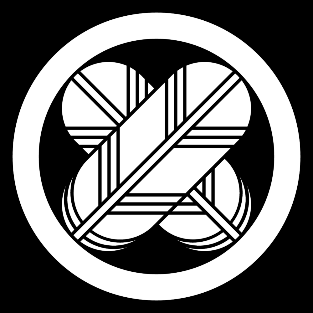 家紋・鷹の羽の一種「丸に違い鷹の羽」。定番家紋の一つ鷹の羽紋種の中でも定番の種類。高い普及率を誇る。